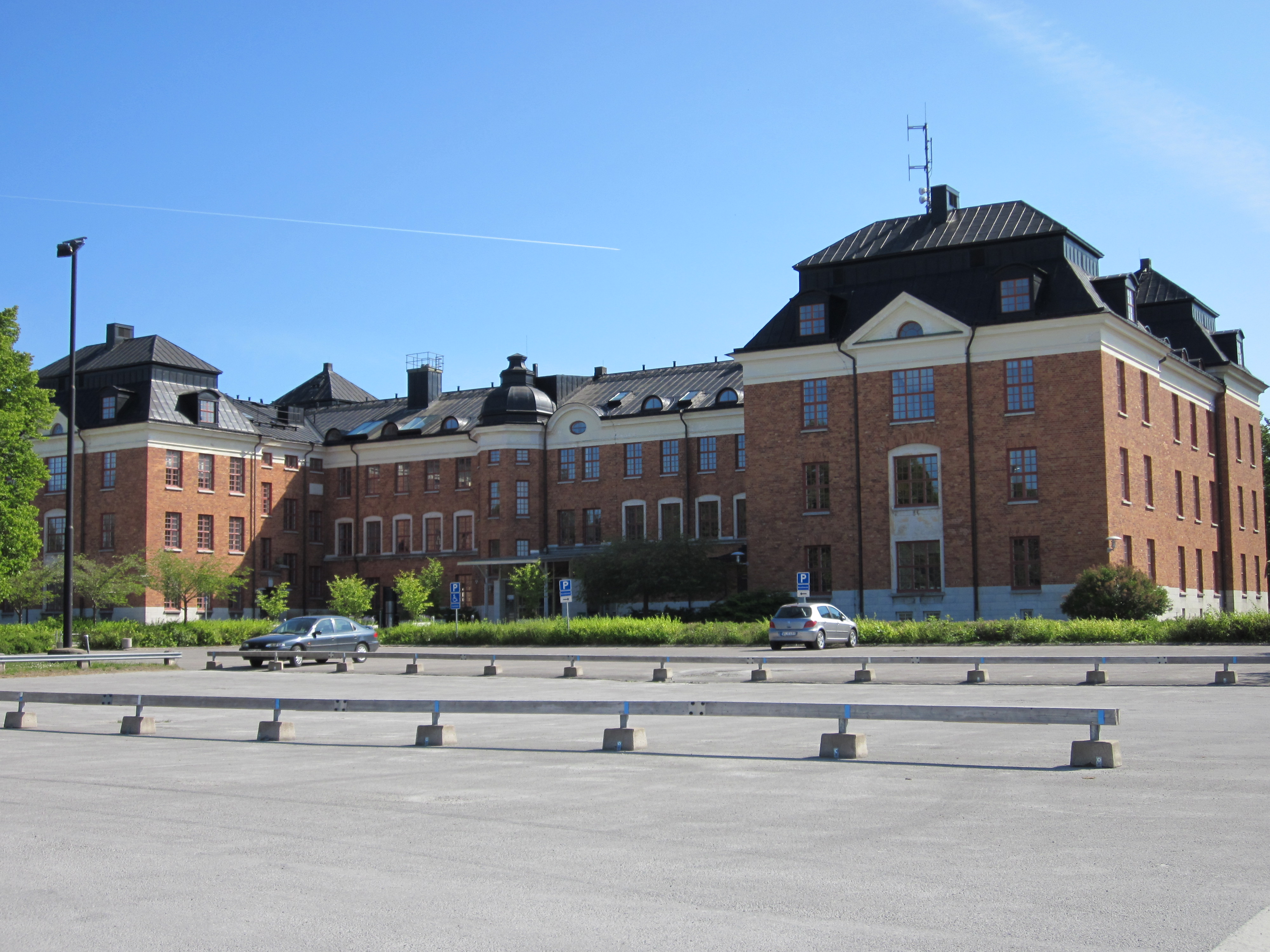 Kanslihuset och Kasern I vid Gotlands artilleriregemente, A 7. Uppfört 1909. Numera (2010) används byggnaden av bland annat Skattemyndigheten, Kronofogdemyndigheten och Vägverket. Se även denna länk.